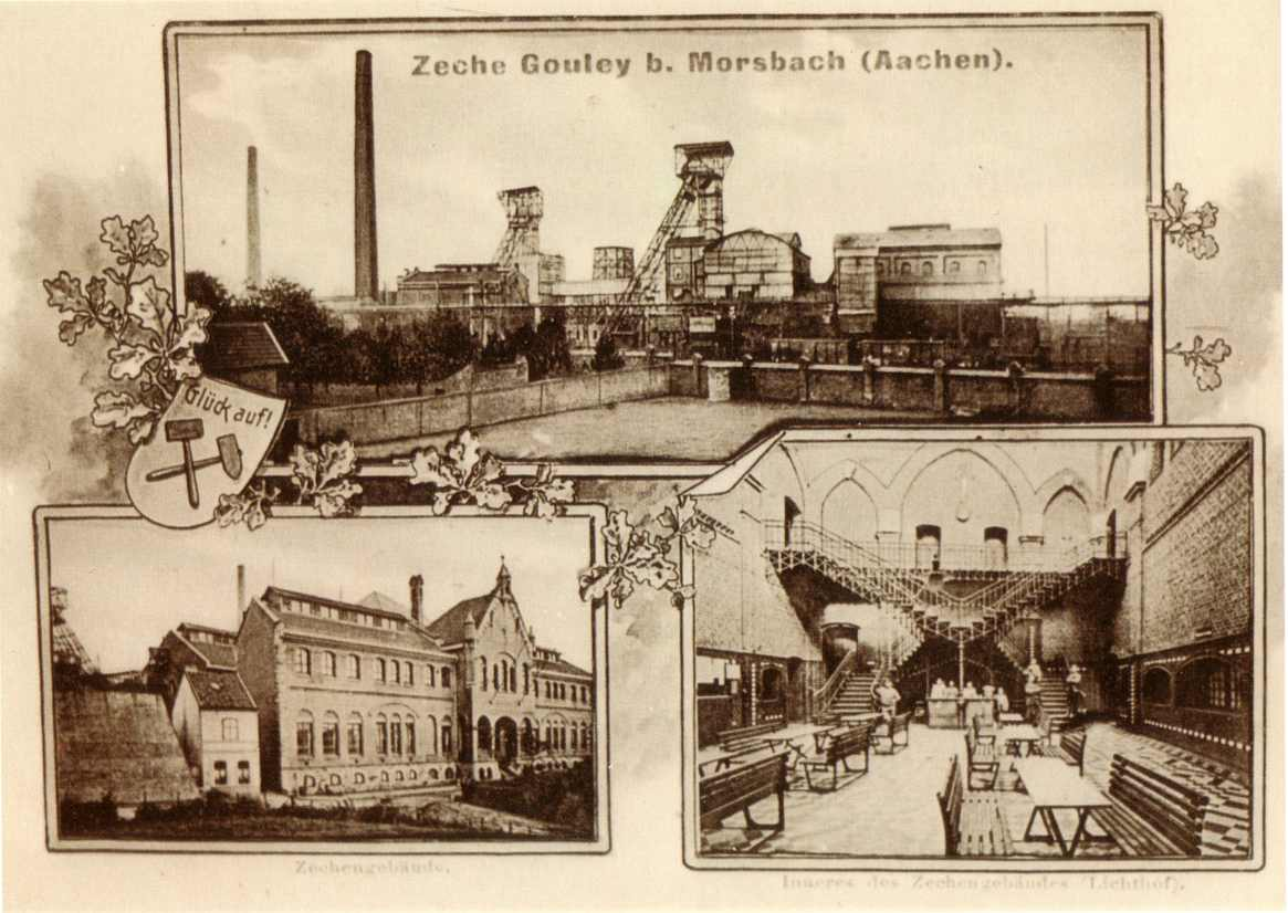 Postkarte, Grube Gouley, Morsbach, Aachener Steinkohlerevier um 1900